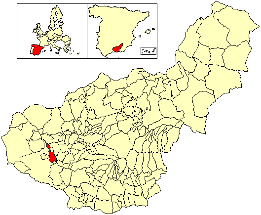 Situación del término municipal de Cacín respecto a la provincia de Granada, en España.